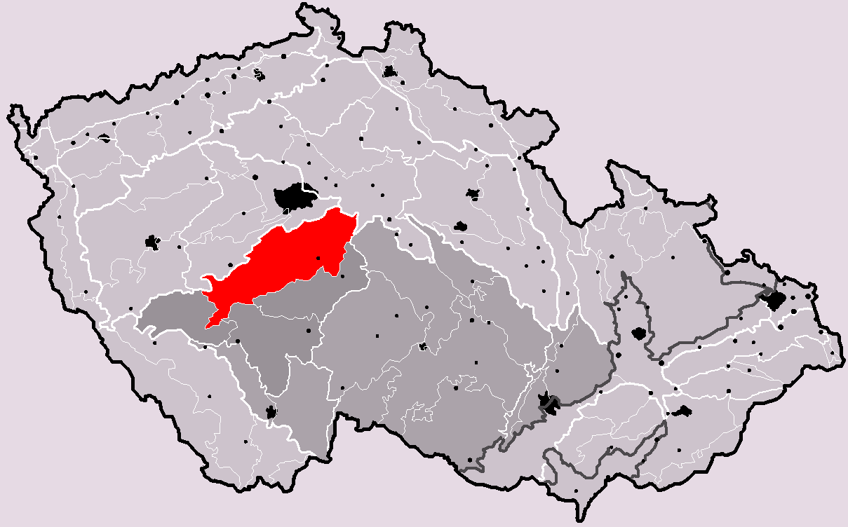 Poloha geomorfologického celku Benešovská pahorkatina v rámci České republiky. Hercynský systém Hercynská pohoří I Česká vysočina I2 (II) Česko-moravská subprovincie I2A (IIA) Středočeská pahorkatina I2A-1 (IIA-1) Benešovská pahorkatina